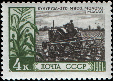 Культивация посевов кукурузы. Художник: А. Завьялов. Марка СССР, номинал - 4коп.